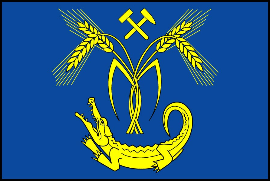 Vlajka obce Tlučná.